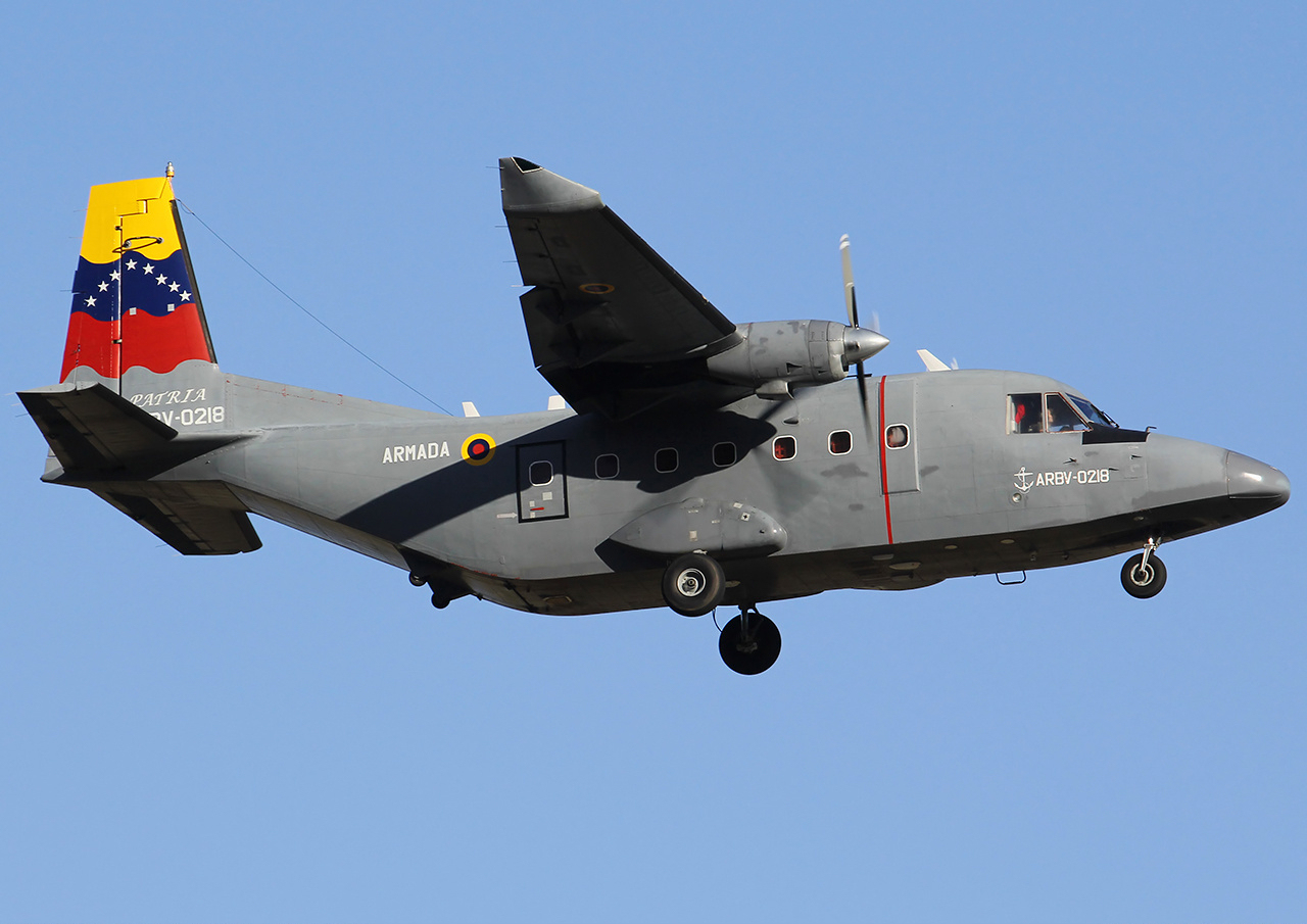 ARBV-0218 (cn 264)